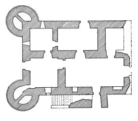 Guzara